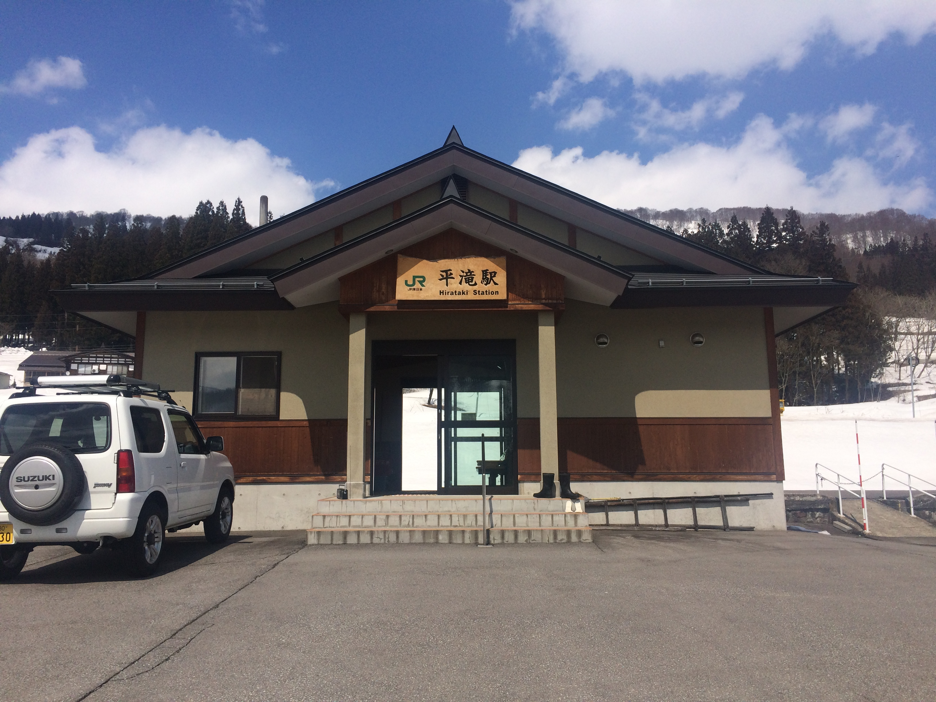 平滝駅のリニューアル後の新駅舎